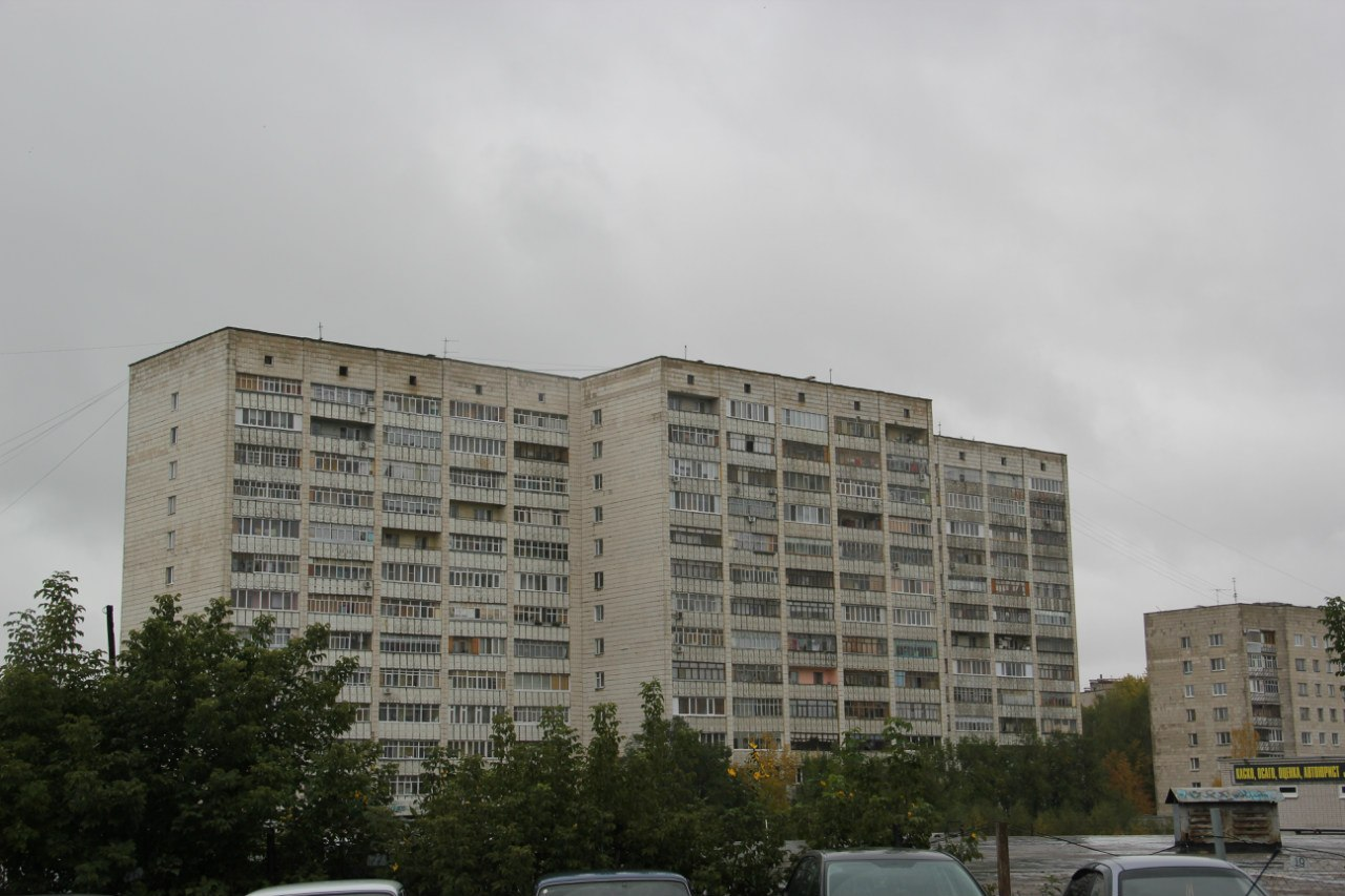 Типовой дом 1-528КП-80ЭК